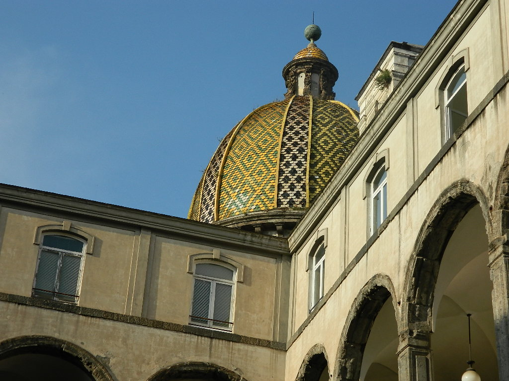 Cupola San Pietro Martire, Napoli